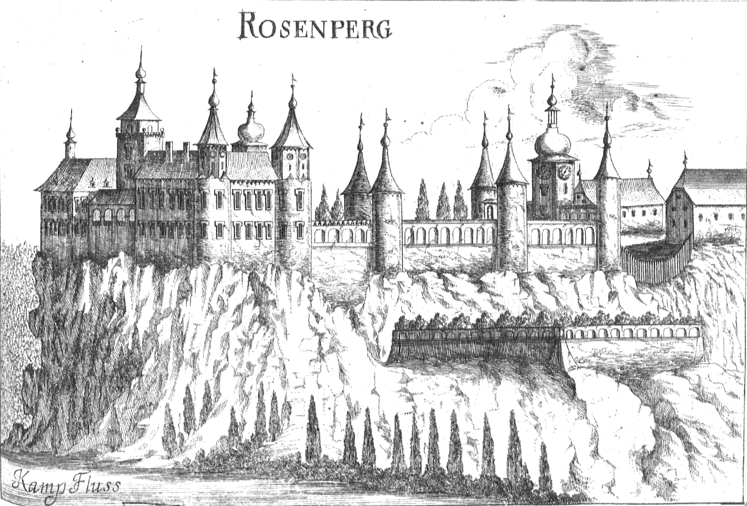 Kupferstich: Das Schloss Rosenburg um 1670